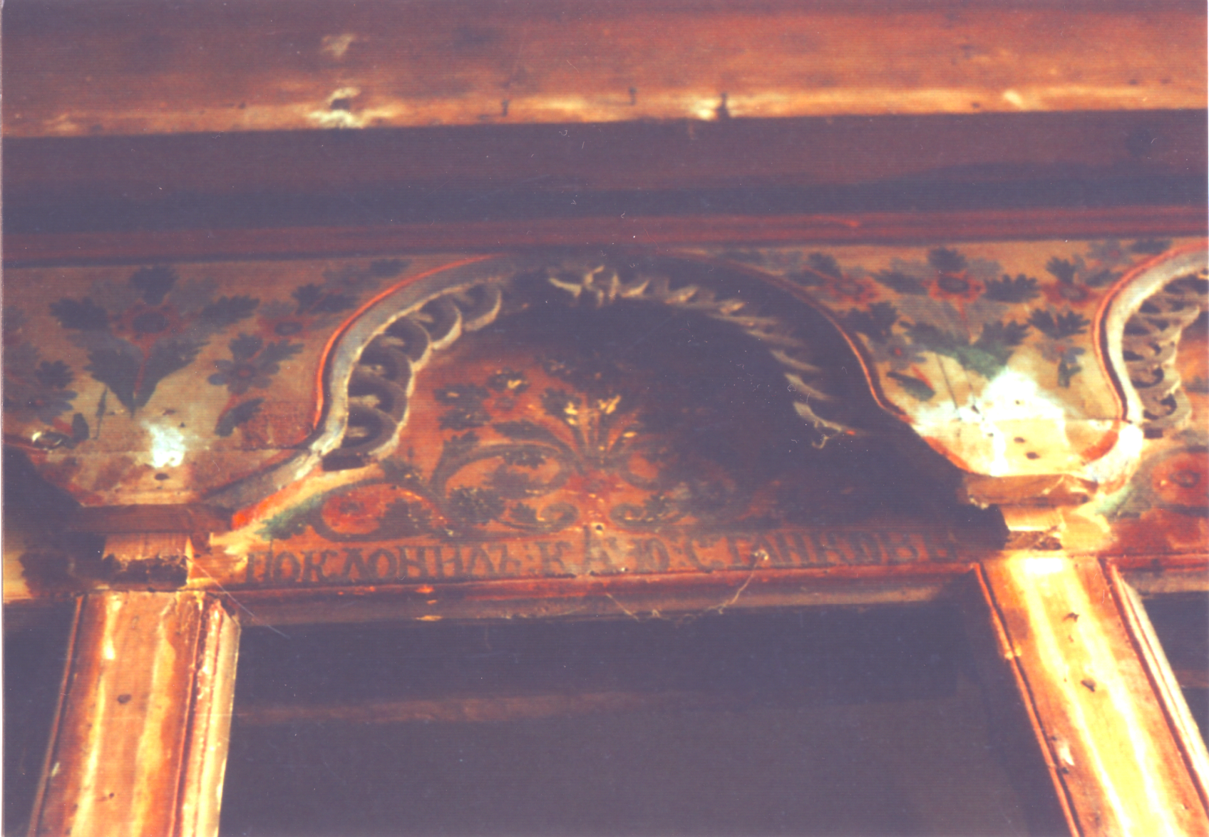 От Църквата на с. Живовци